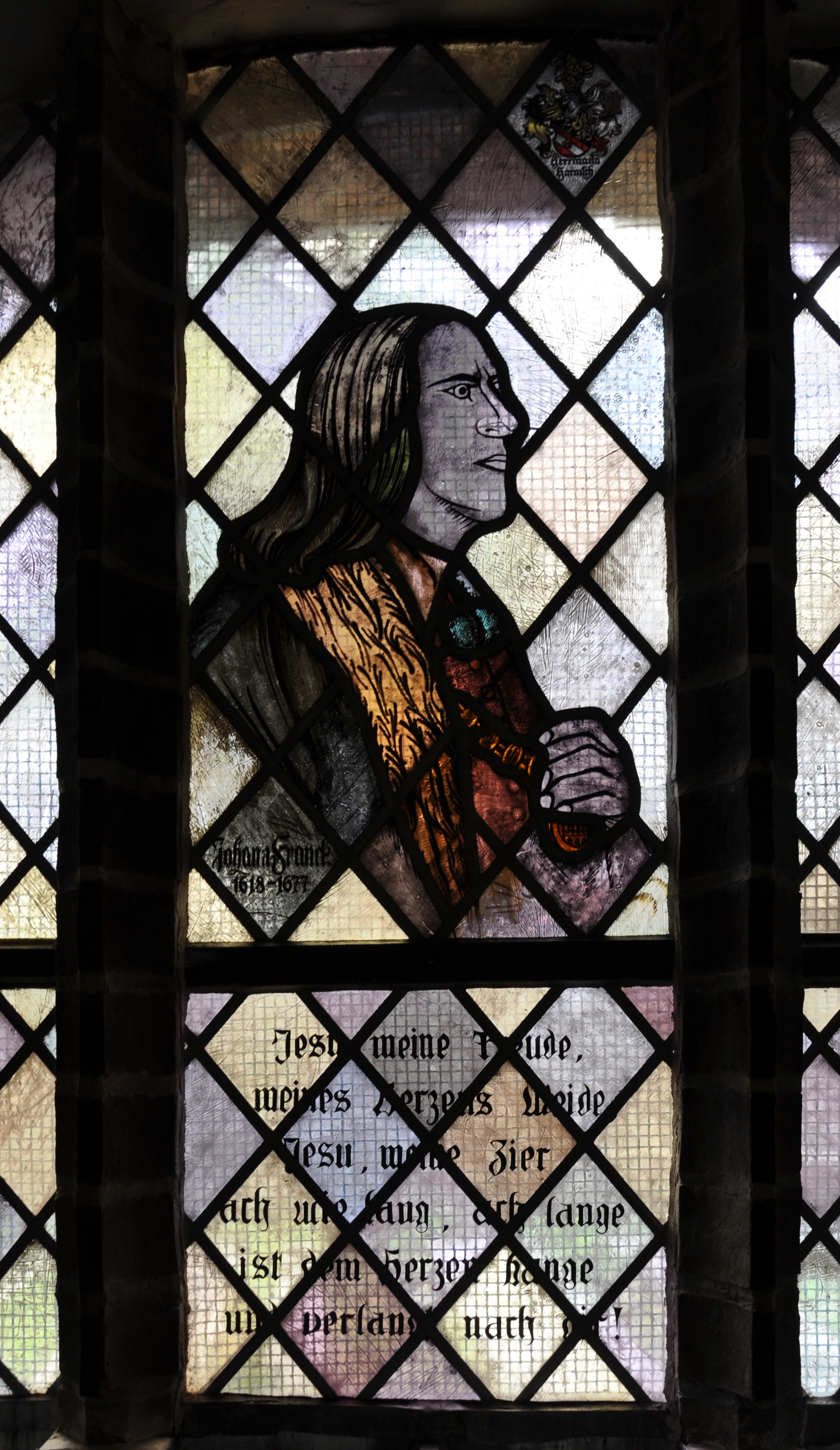 Lübben, Paul-Gerhardt-Kirche, Fenster mit Portrait von Johann Franck